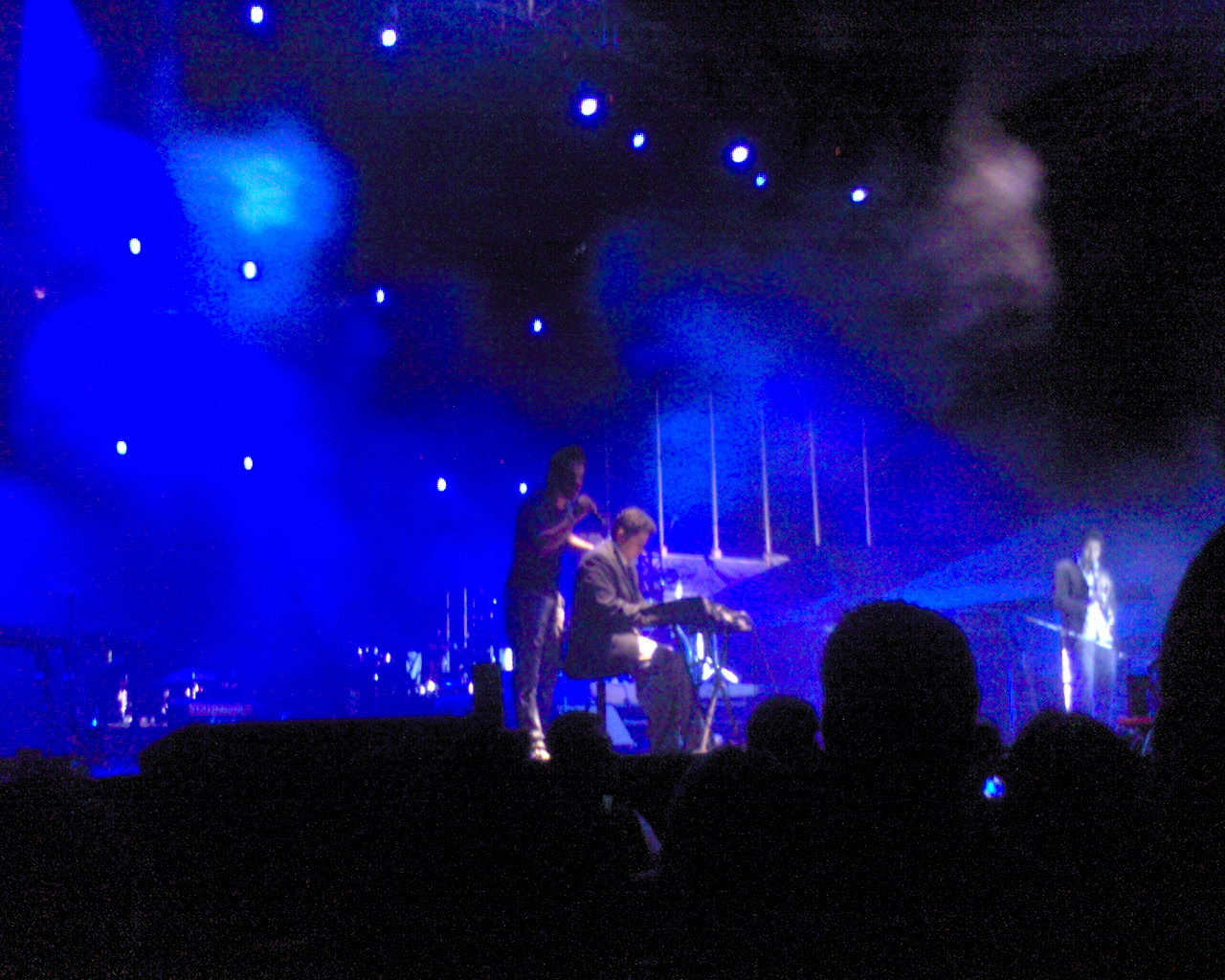 Carlos Enrique Peña Aldana. Ganador de Latin American Idol - Segunda temporada. Movistar Music Fest, El Salvador. 2008